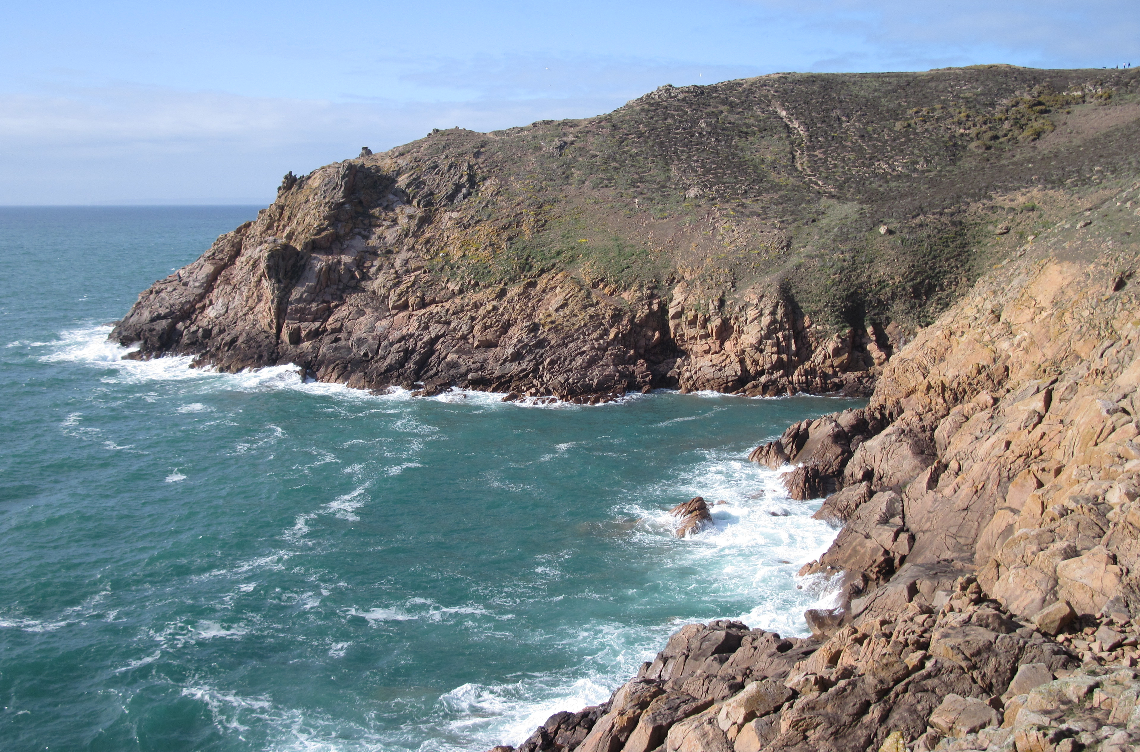 Nrf: Rouoge Nez, Les Landes, Jèrri